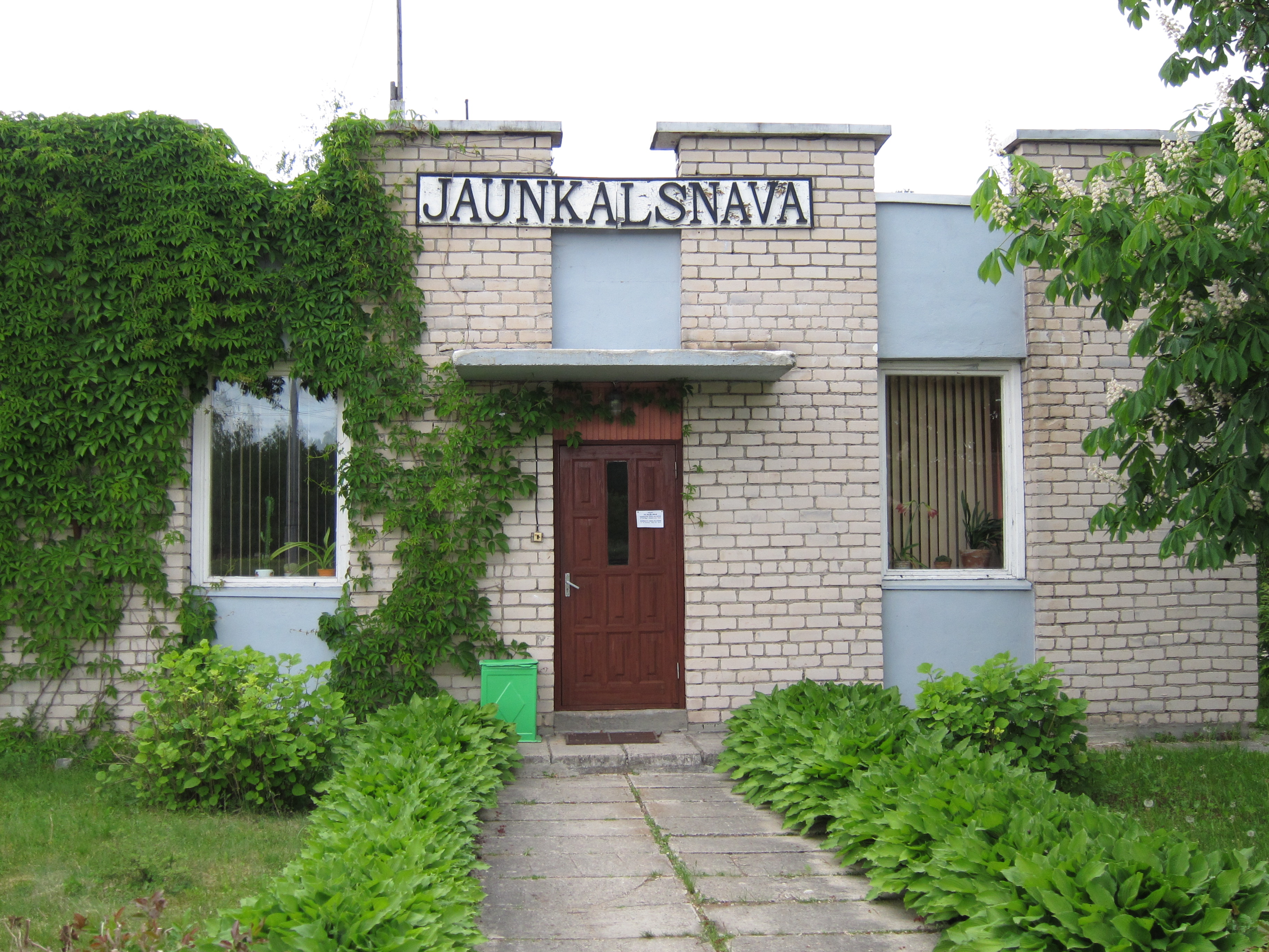 Jaunkalsnavas stacijas ēka.